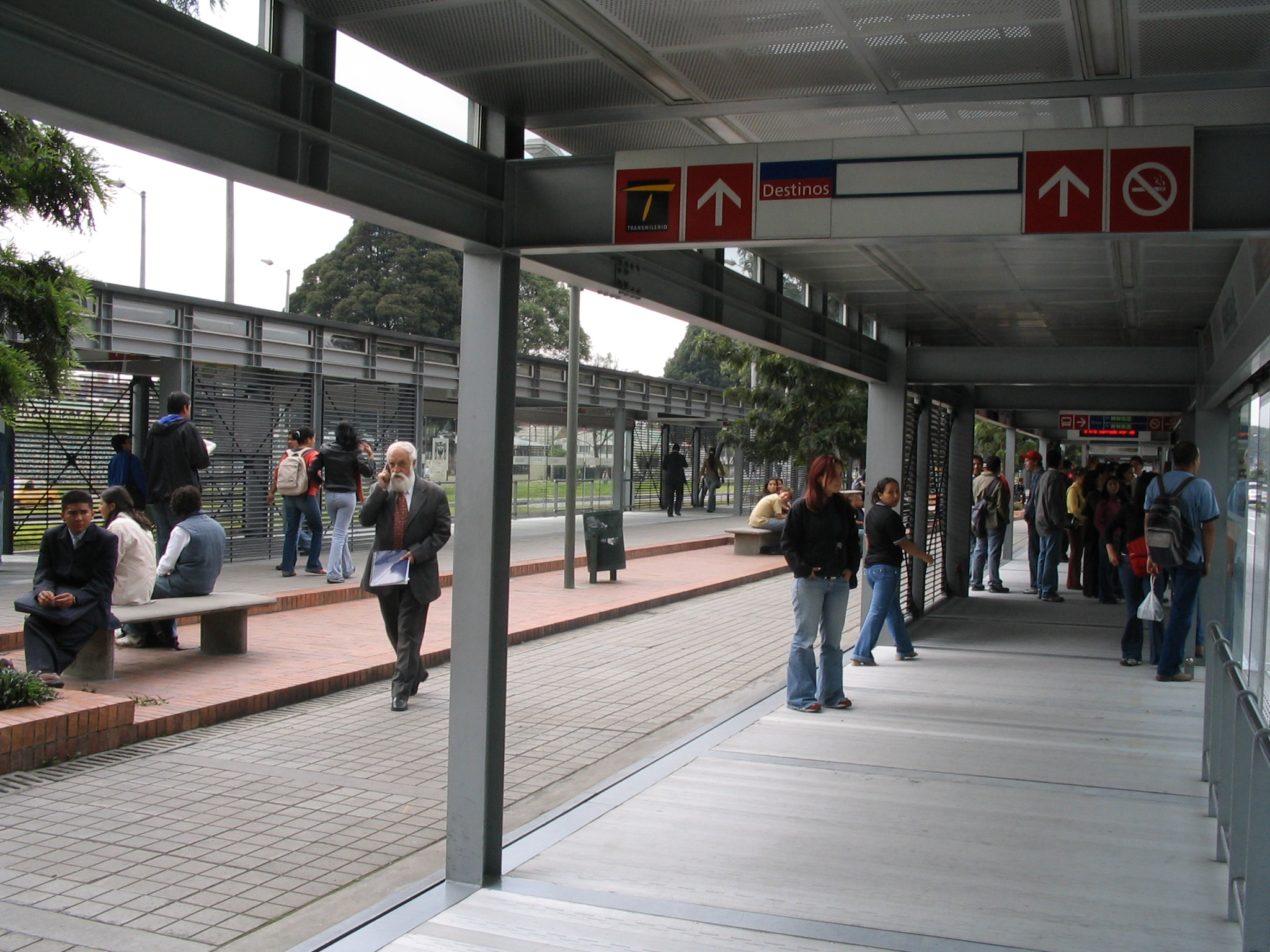 Los Héroes bus stop, TransMilenio system "Aspecto interior de una de las estaciones de transmilenio, Sistema de Bus Rápido de Bogotá. La fotografía corresponde a la estación de Los Héroes. Fotografía tomada por Tequendamia para la Wikipedia."